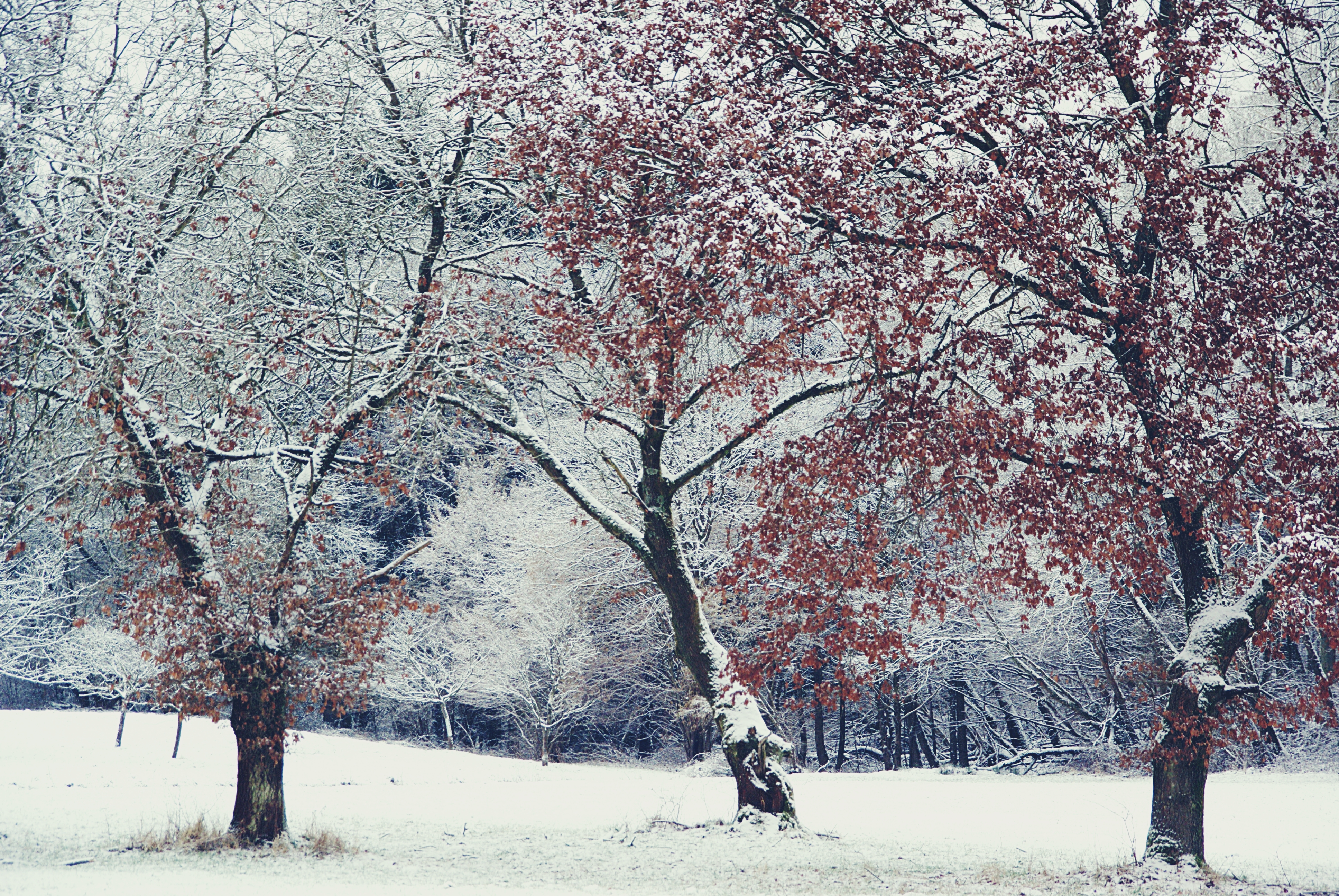 (NSG:HE-1439029)_Theißtal von Niedernhausen